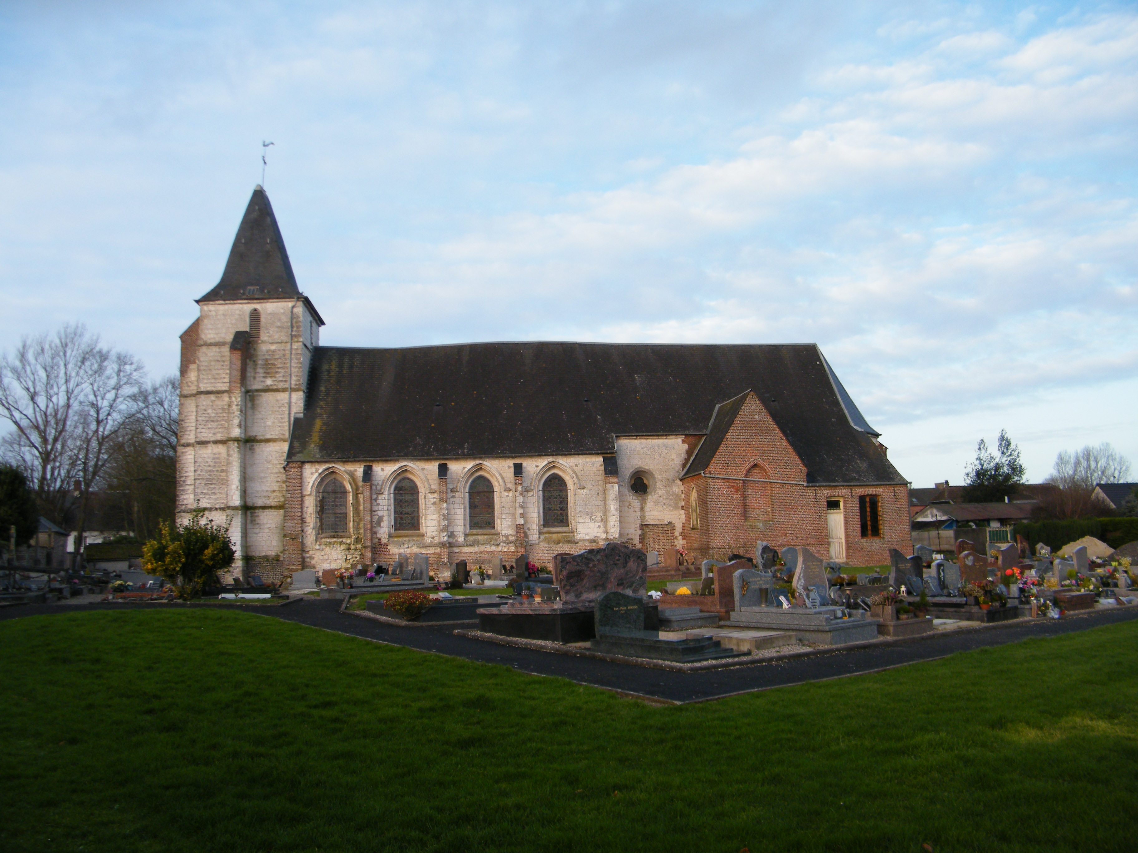 église.